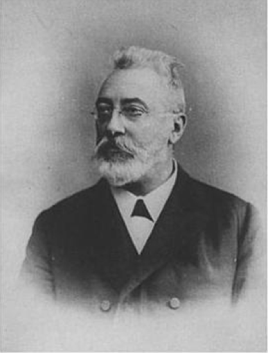 Franz von Juraschek, österreichisch-ungarischer Statistiker